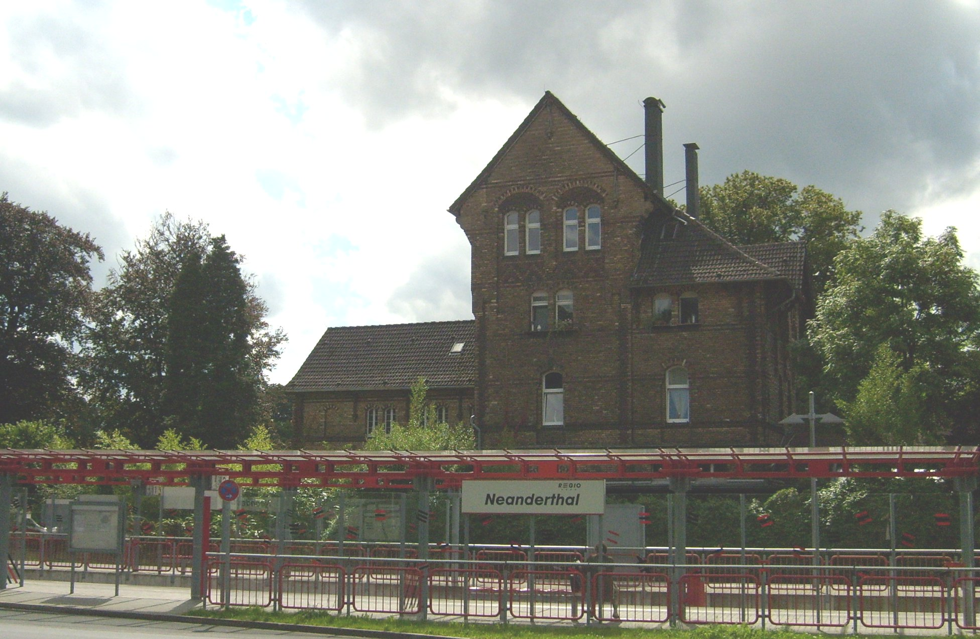 Altes Bahnhofsgebäude der Station Neandertal - Strecke der "Rheinischen Bahn", 1879 eröffnet. An der Mauer befand sich ein Höhenschild: 109 m über NN. Das Gebäude ist in Privatbesitz und nicht zugänglich, sämtliche Bahnhöfe der Strecke wurden in den späten 1990er Jahren komplett umgebaut und modernisiert. Bis dahin wurde die Strecke nur für Schienenbusse und Güterzüge des Kalkwerkes Neandertal genutzt. Heute fährt dort die Regiobahn S28 von Kaarst über Neuss, Düsseldorf, Erkrath nach Mettmann.